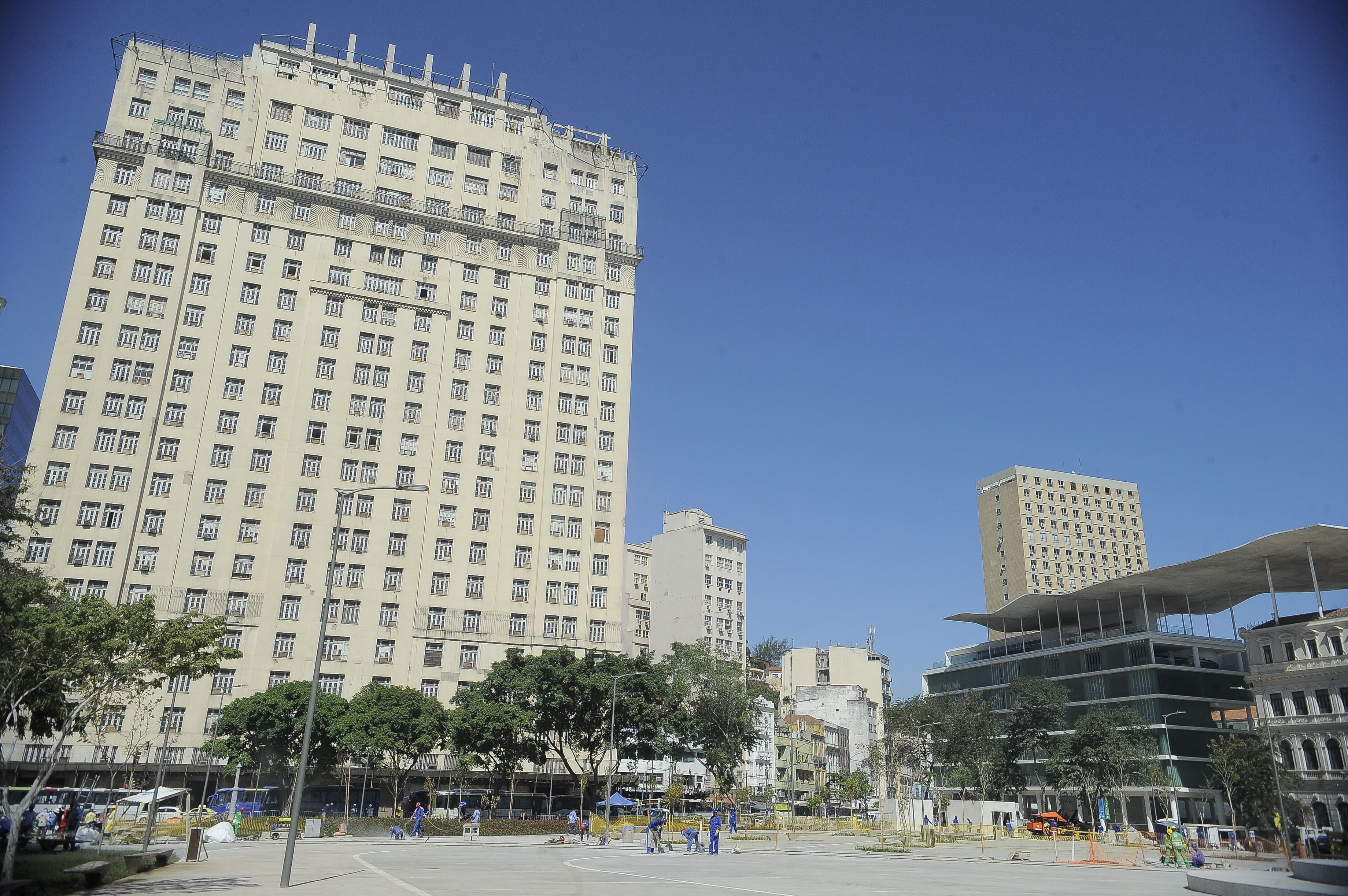 O edifício A Noite à época de seu tombamento oficializado pelo Iphan. O prédio foi sede da Rádio Nacional por décadas